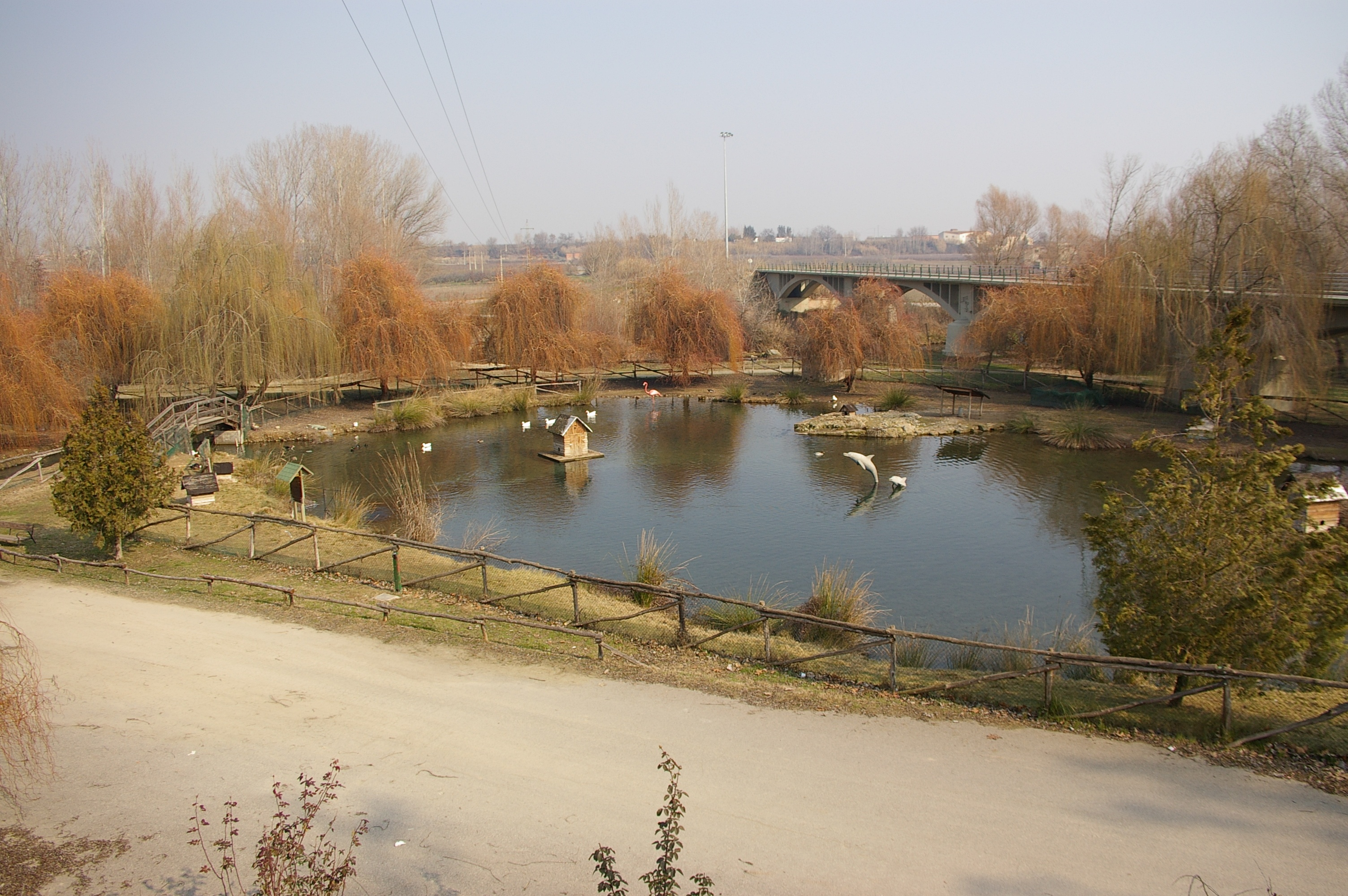 Parque del río, en Corbins